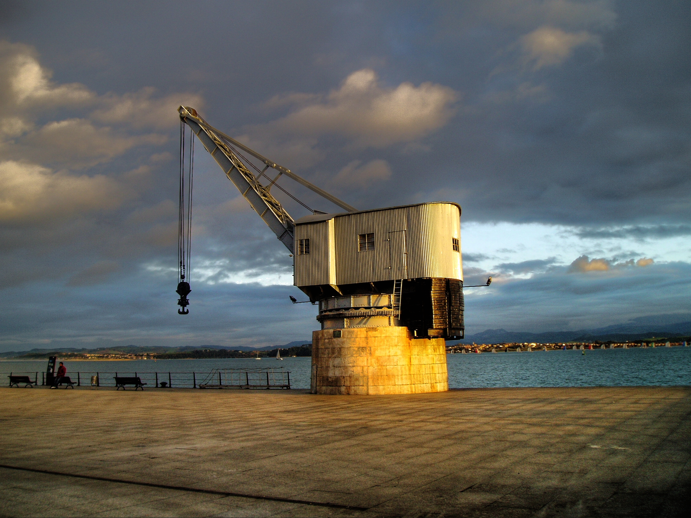 Grua de Piedra (Santander, España)